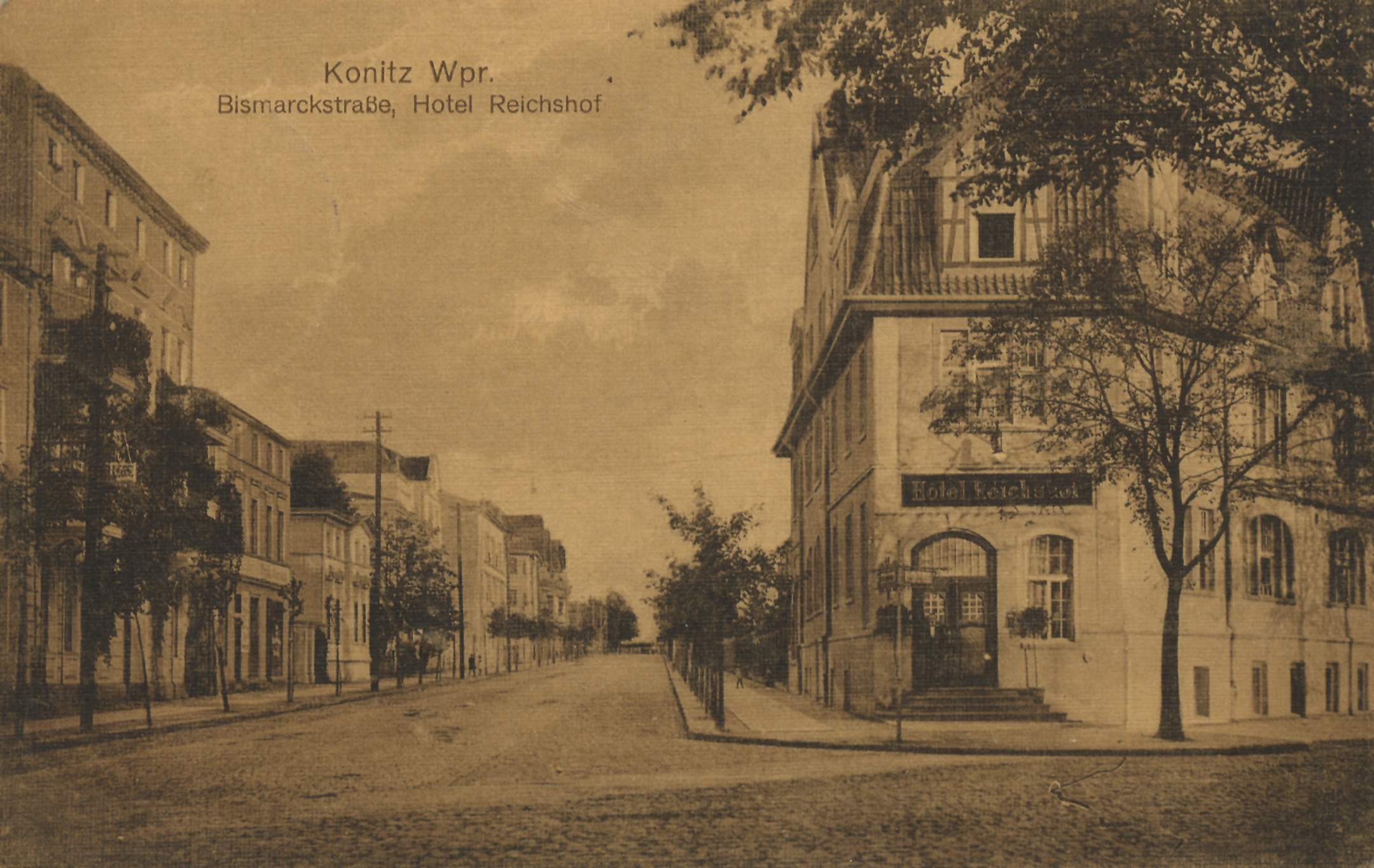 Bismarckstraße, Hotel Reichshof